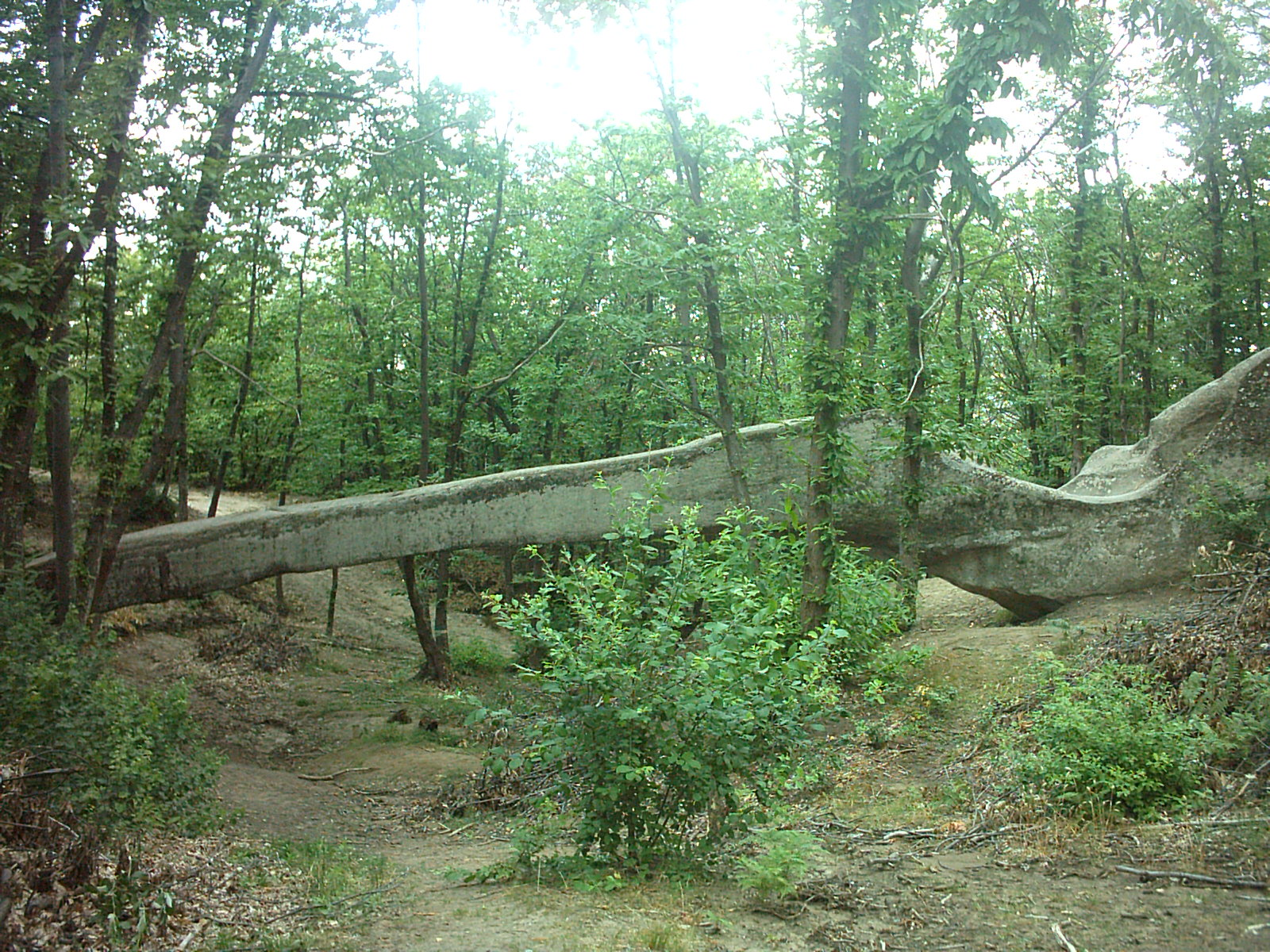 "Ponte Ercole" o "Ponte del Diavolo", Polinago (MO) Italy Risultato di erosione su blocco monolitico di Arenaria, situato in località Brandola